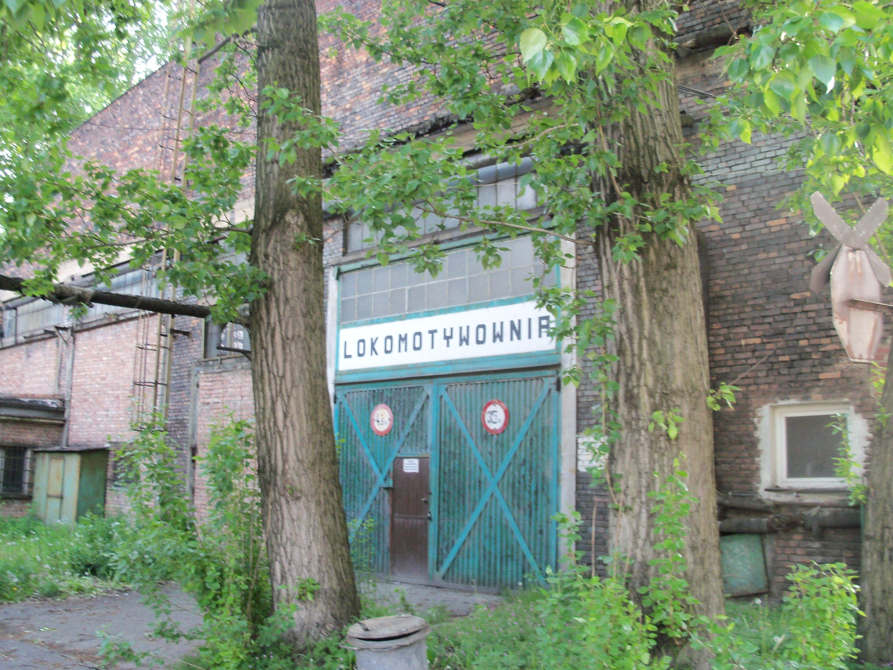 Huta Baildon w Katowicach - Lokomotywownia